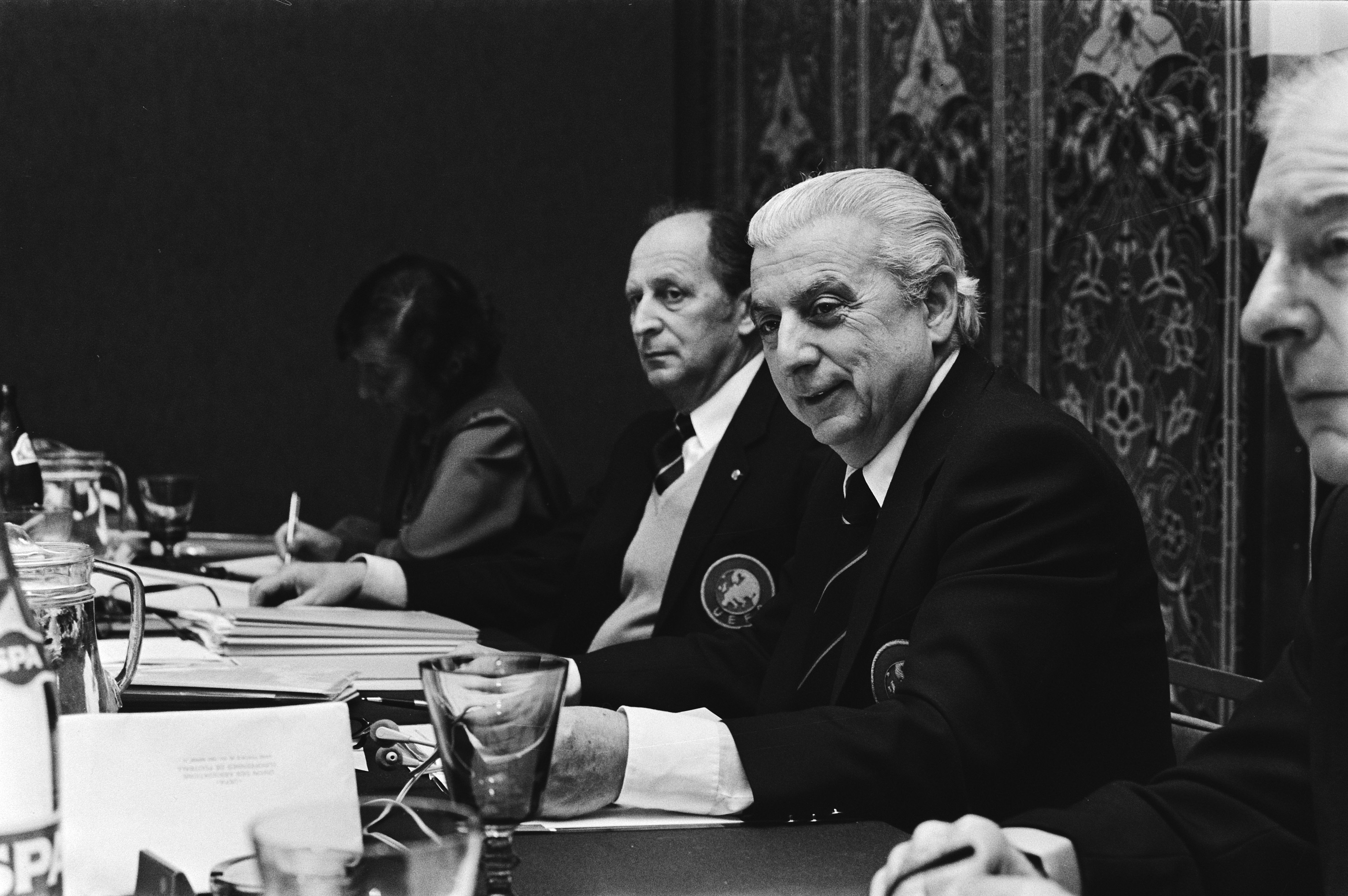 Collectie / Archief : Fotocollectie Anefo Reportage / Serie : [ onbekend ] Beschrijving : De UEFA vergadert in het Hilton Hotel in Amsterdam; UEFA president A. Franchi (r) en secretaris H. Bangerter Datum : 16 november 1979 Locatie : Amsterdam, Noord-Holland Trefwoorden : secretarissen, sport, vergaderingen, voetbal, voorzitters Persoonsnaam : Bangerter, Hans, Franchi, Artemio Fotograaf : Bogaerts, Rob / Anefo Auteursrechthebbende : Nationaal Archief Materiaalsoort : Negatief (zwart/wit) Nummer archiefinventaris : bekijk toegang 2.24.01.05 Bestanddeelnummer : 930-5434